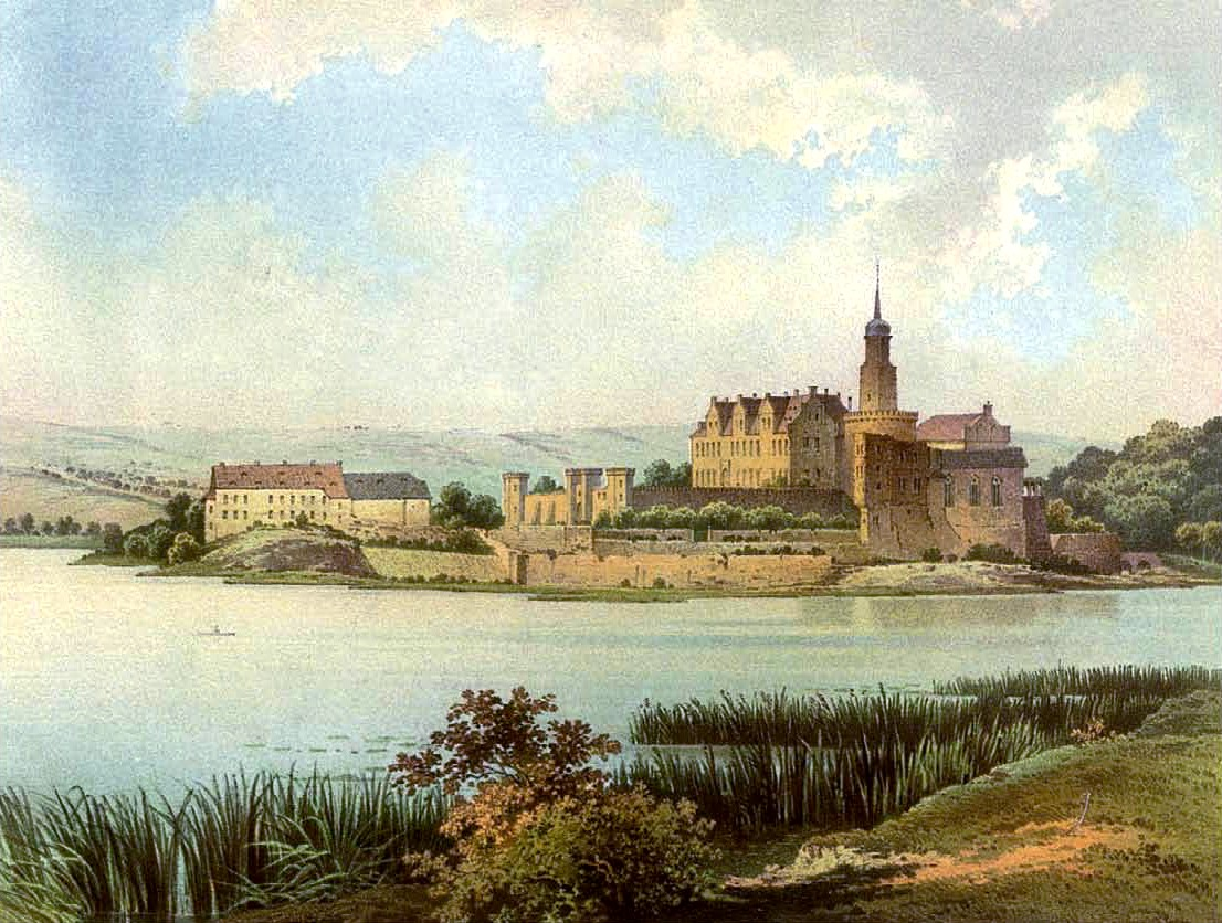 Schloss Seeburg, Mansfelder Seekreis, Provinz Sachsen, Lithografie aus dem 19. Jahrhundert